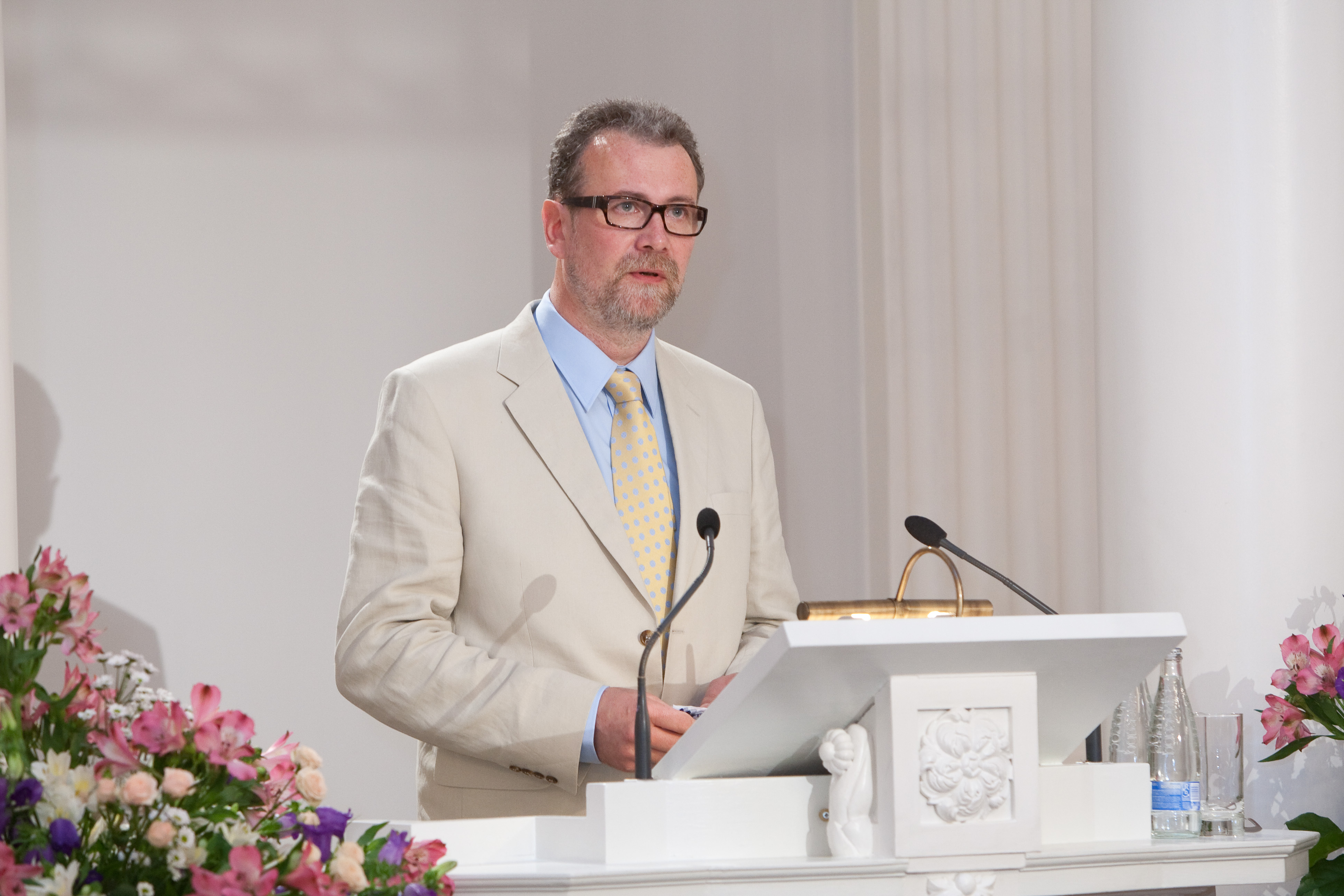 Professor Kristjan Zobel pidamas akadeemilist loengut Tartu Ülikooli REALIA ET NATURALIA (loodus- ja tehnoloogiateaduskonna, matemaatika-informaatikateaduskonna) valdkondlikul magistriõppe lõpuaktusel TÜ aulas 16. juunil 2010.